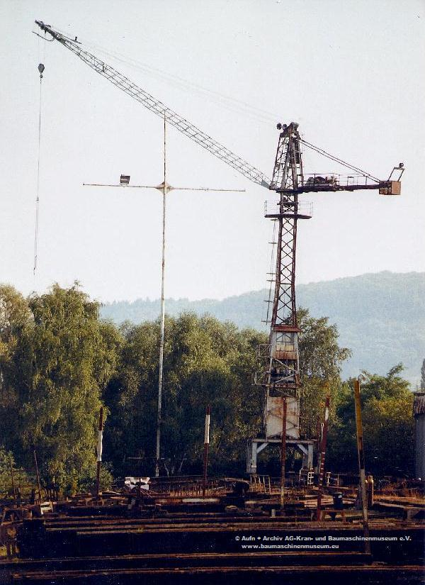 Wolff_Museums_Ur-Baukran_Form_45_EW_(cAG-KBM)